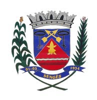 Brasão de Armas do município de Sengés, Paraná, Brasil.